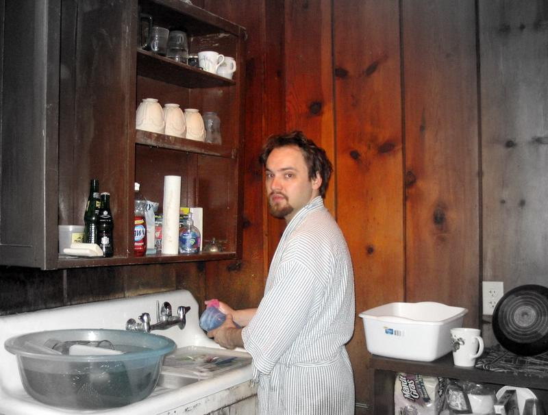 Quadell cleaning up